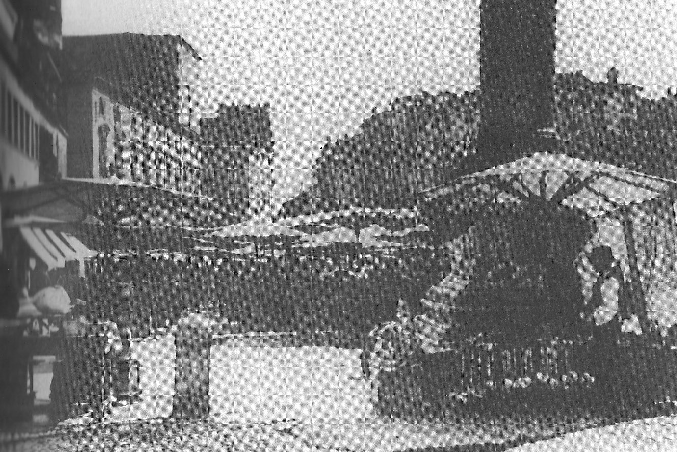 Piazza Erbe a Verona nella metà del 1800